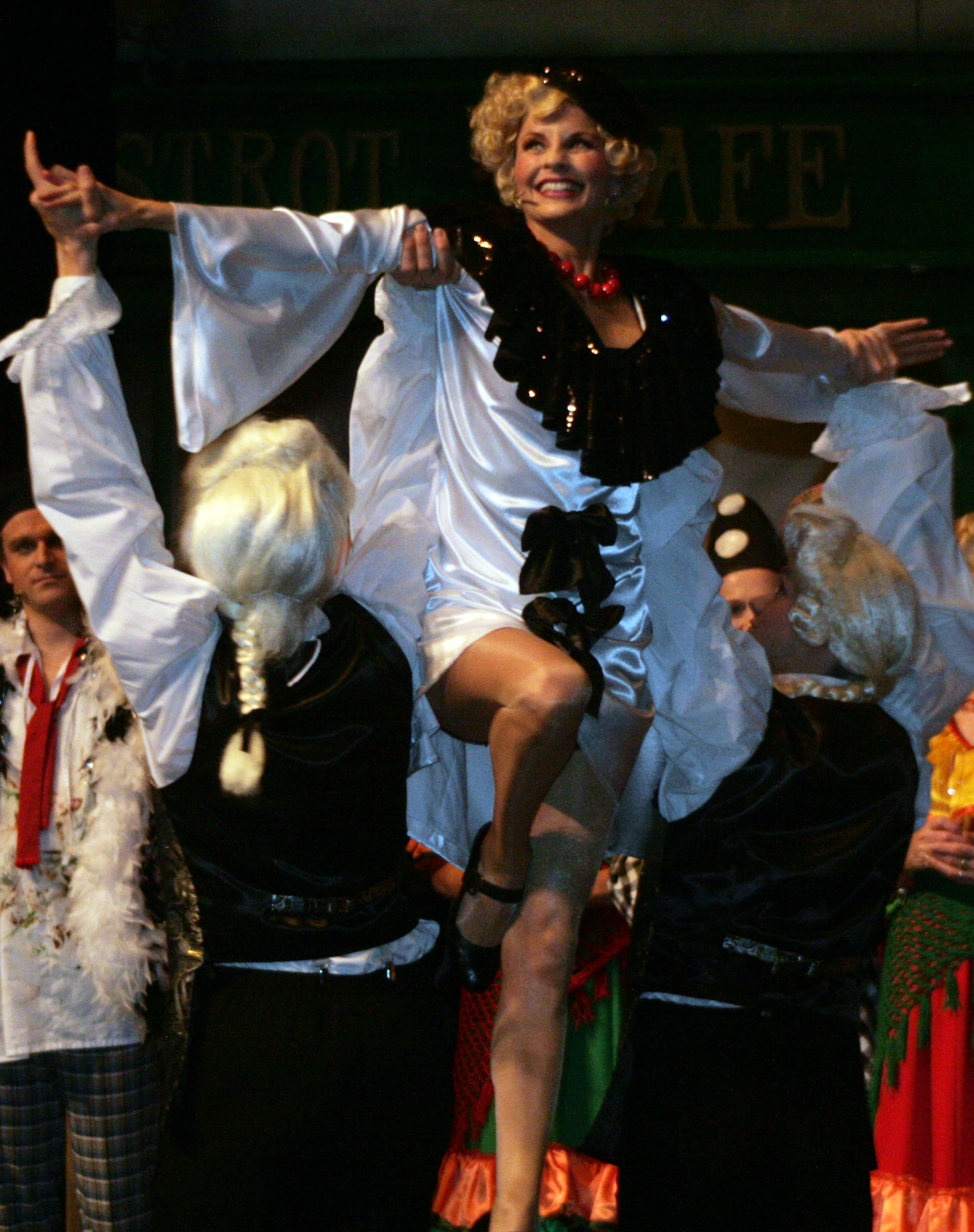 Janine Kitzen, niederländische Opern- und Musical-Sängerin (Sopran)